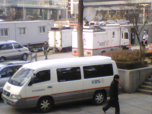 2008년에 제가 직접 찍어서 네이버 카페에 올린 사진입니다.